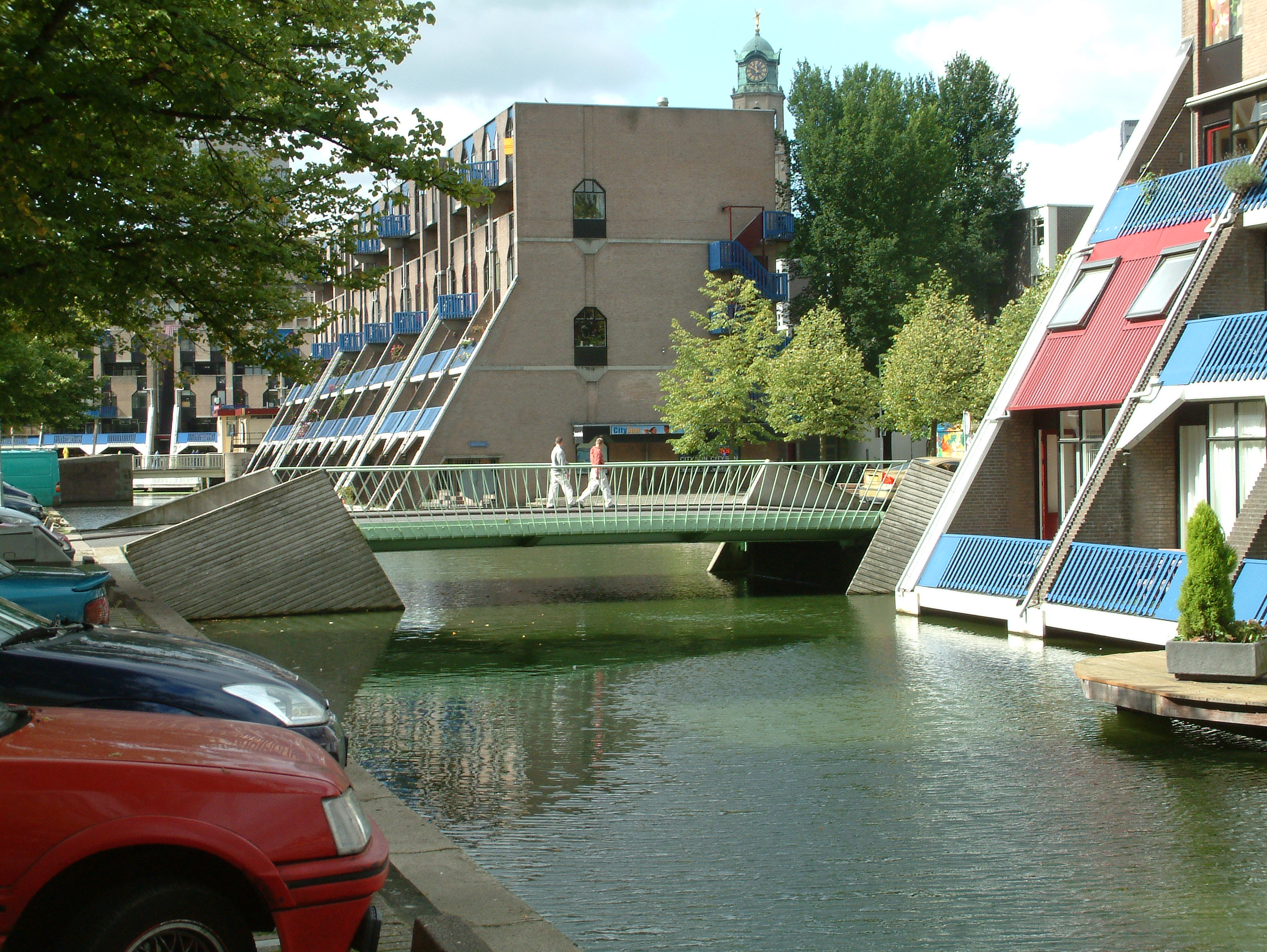 Bruggen over de Rotte, De St. Jacobsbrug, oostkant